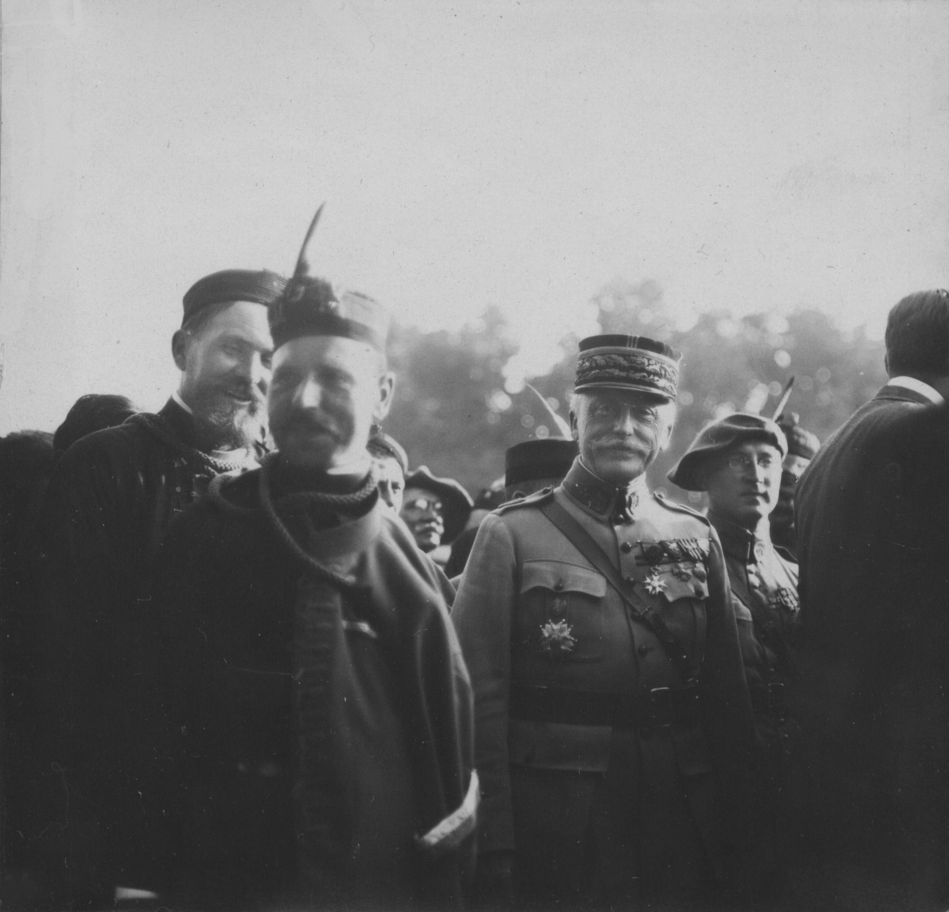 Le général Maurice Pellé en poste à Prague en représentation lors des Sokols de Juin 1920.